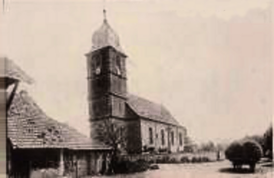 Au premier plan à gauche "Caserne des pompier de Burnhaupt-le-Bas. Au secondd plan centre, l'église. Photo prise entre 1860 et 1913.